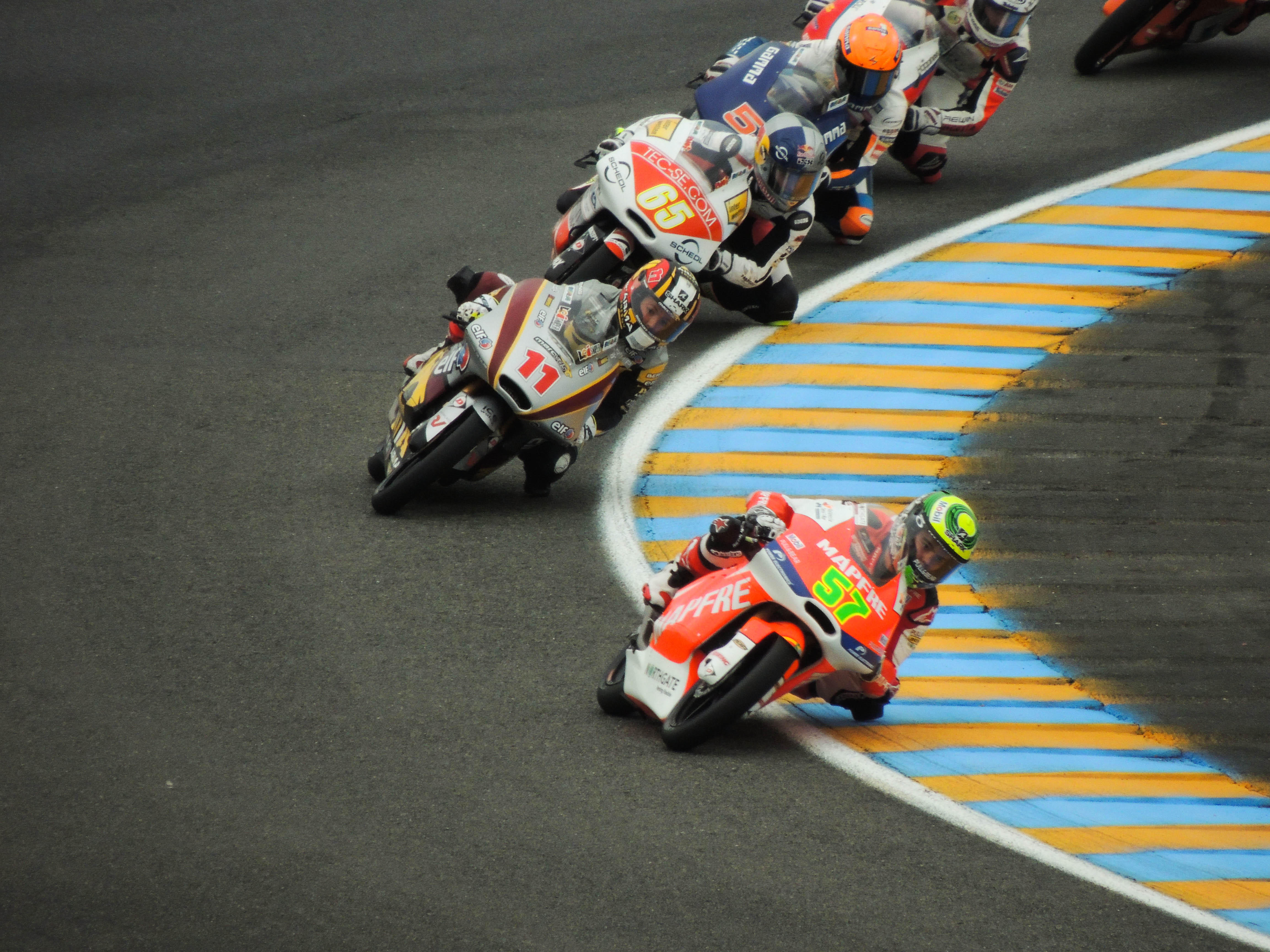 Pilotes en course dans la catégorie Moto 3. Eric Granado (57), Livio Loi (11), Philipp Oettl (65)